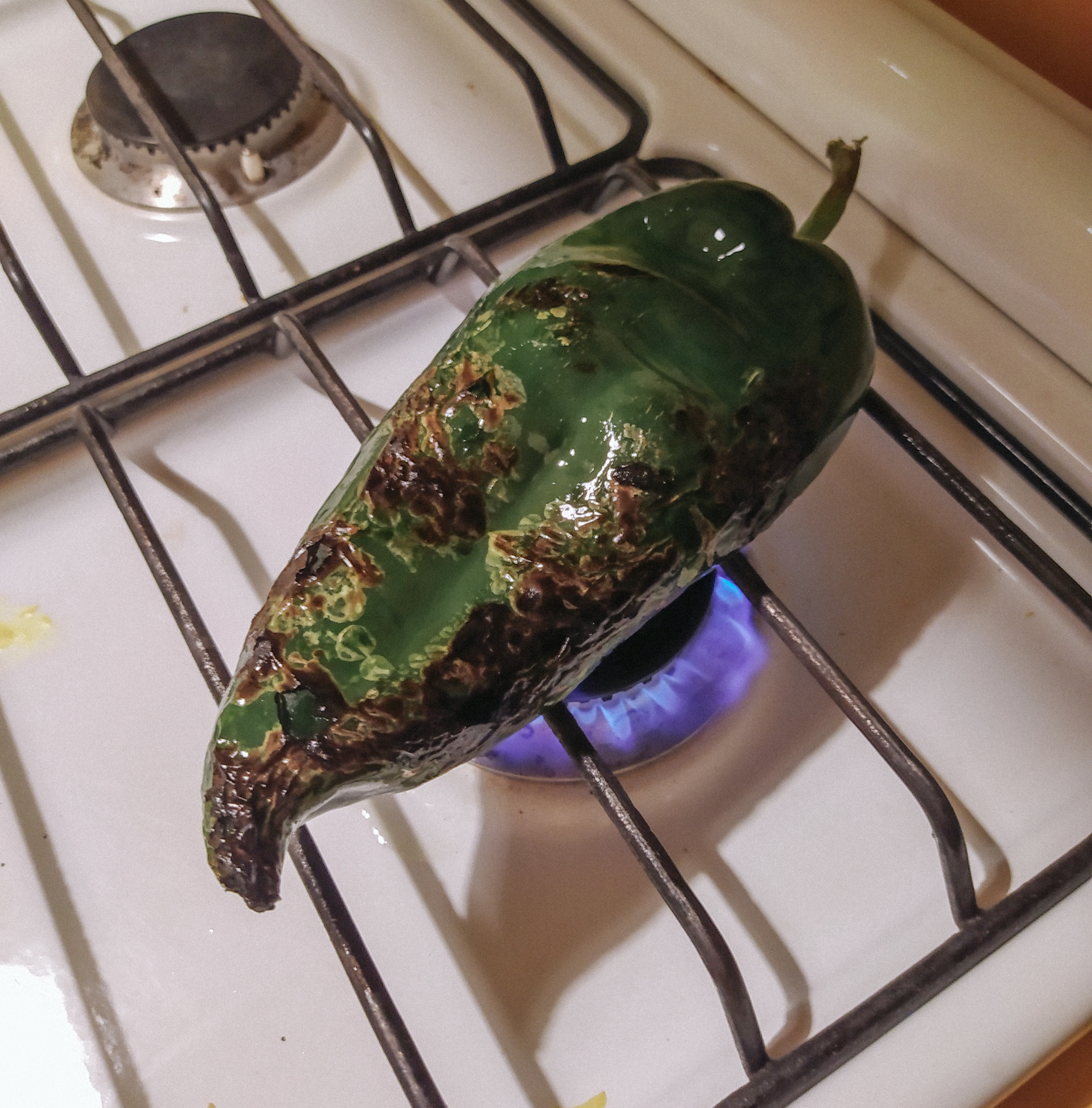 Chile siendo tatemado en el fuego.